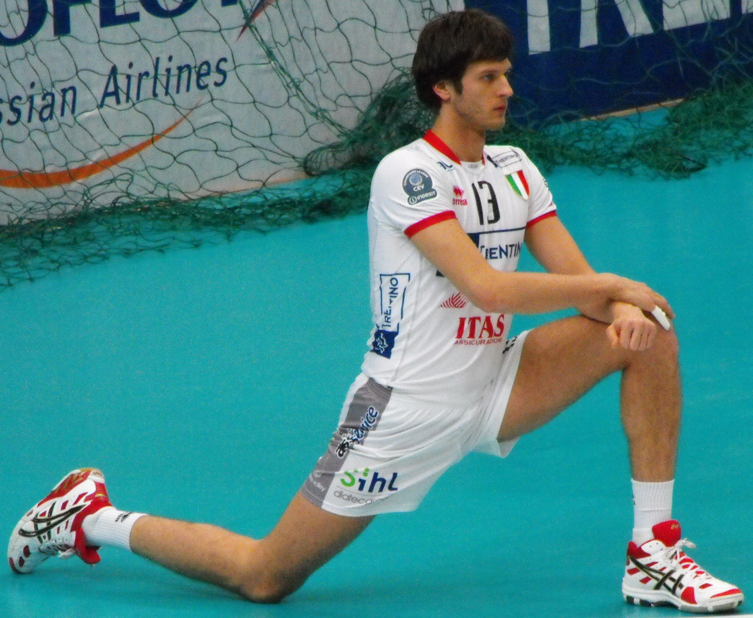 Michal Winiarski